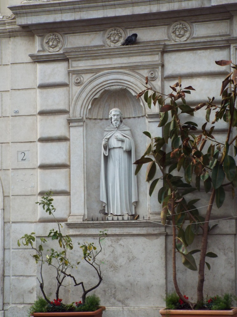 Jozafat Kuncewicz